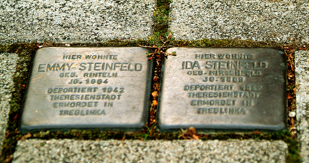 Zum Zeitpunkt der Aufnahme waren zwei Stolpersteine vor den Torhäusern zum Heinemanhof in Hannover-Kirchrode, Brabeckstraße 86 durch private Initiative gesetzt: "Hier wohnte Emmy Steinfeld, geb. Rinteln, Jg. 1864, deportiert 1942, Theresienstadt, ermordet in Treblinka". "Hier wohnte Ida Steinfeld, geb. Hirschfeld, Jg. 1869, deportiert 1942, Theresienstadt, ermordet in Treblinka" ...